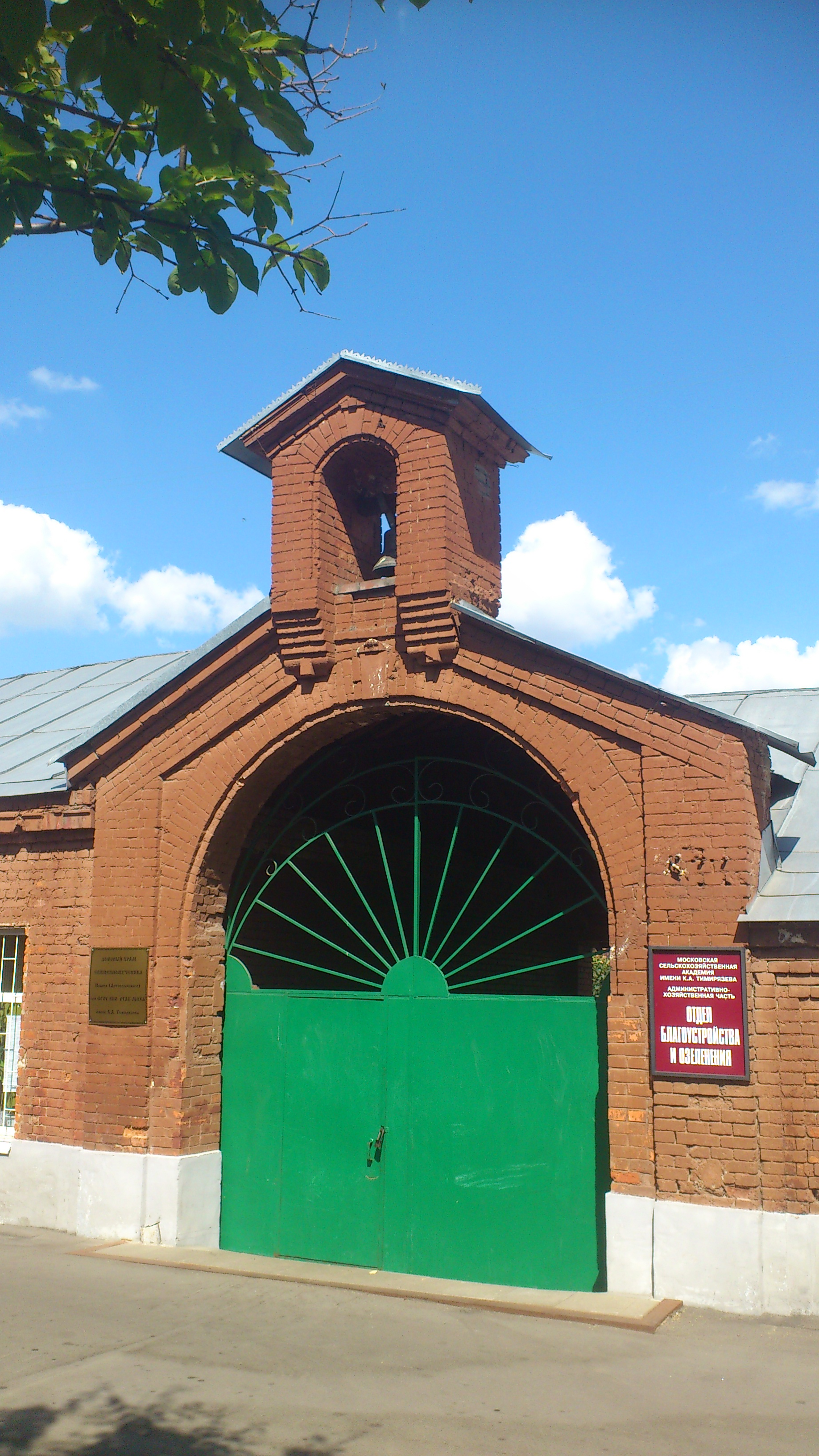 Церковь священномученика Иоанна (Артоболевского) при Московской сельскохозяйственной академии имени К. А. Тимирязева